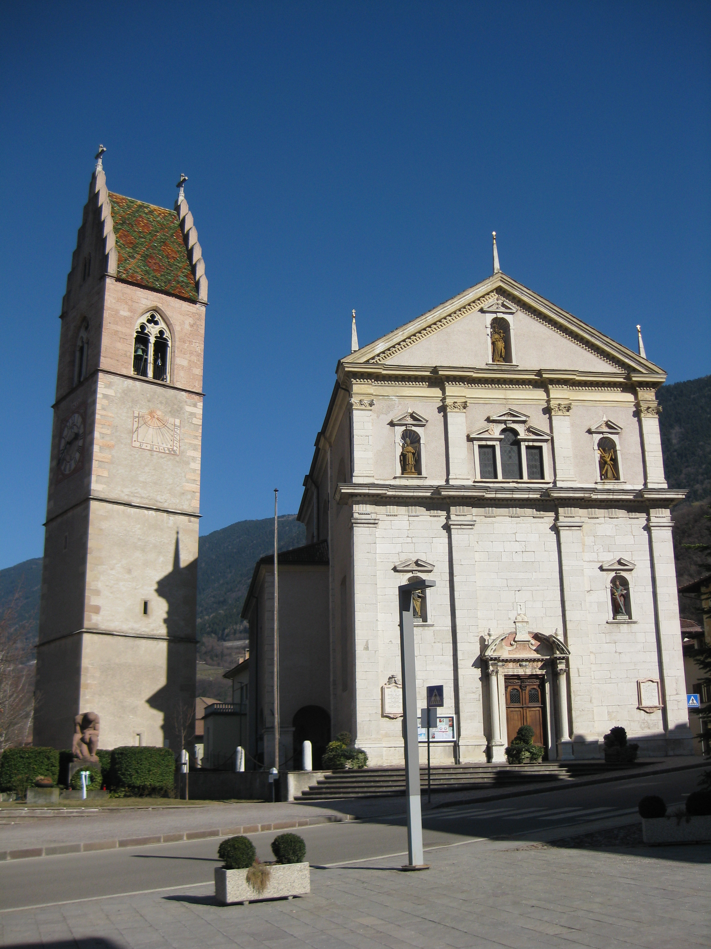 St. Andreas in Salurn